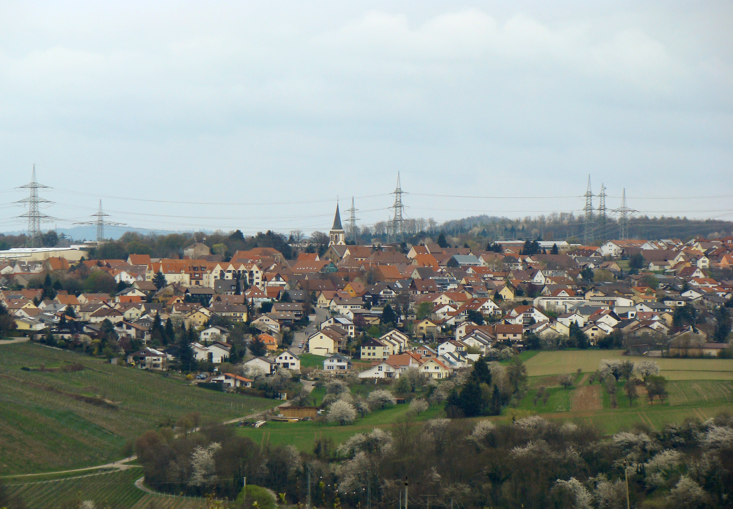 Blick auf Neckarwestheim